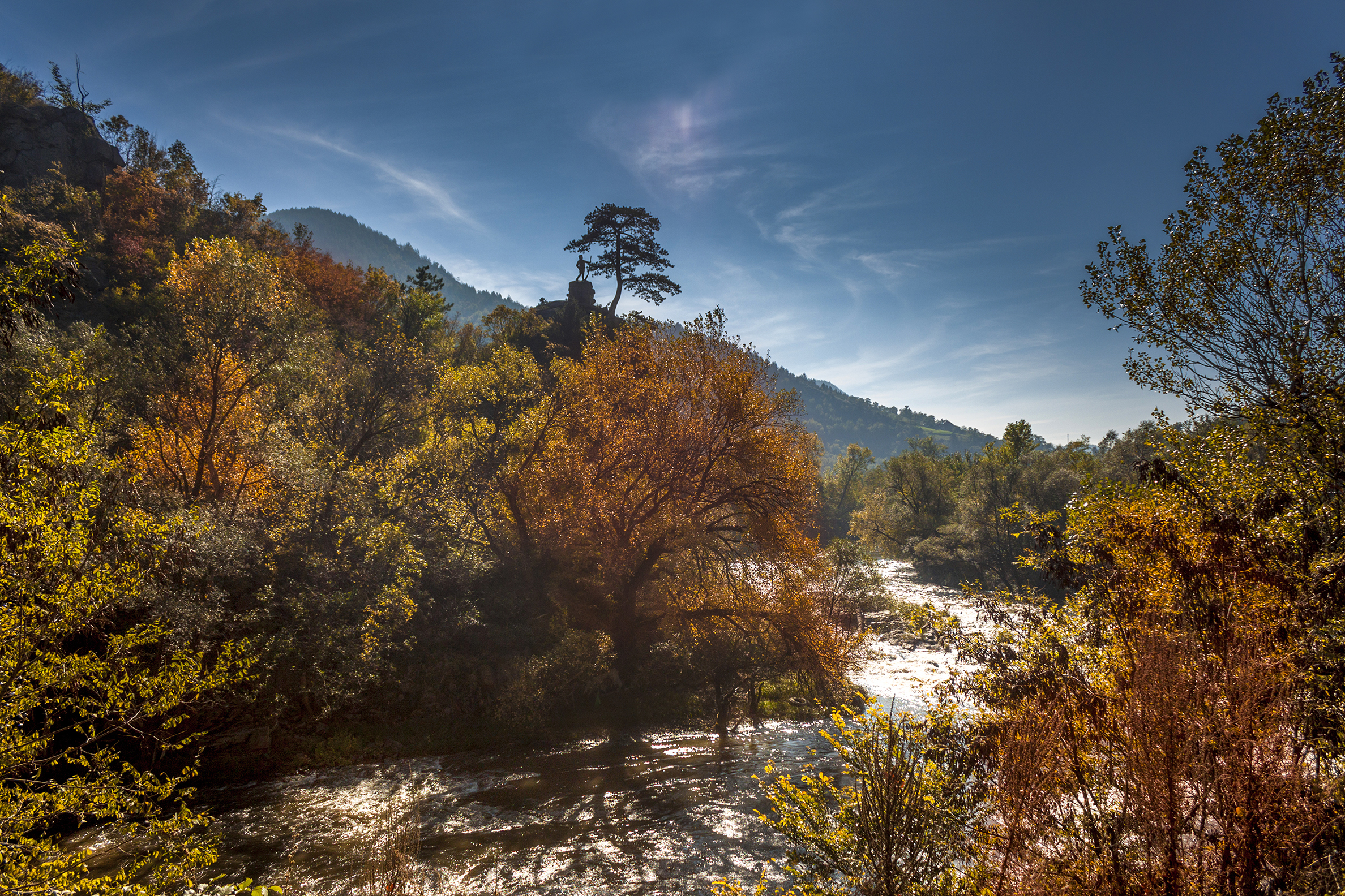 Споменик Српским јунацима Ово је фотографија заштићеног природног добра у Србији под шифром: СП181 This is a a photo of a natural area in Serbia with ID: СП181